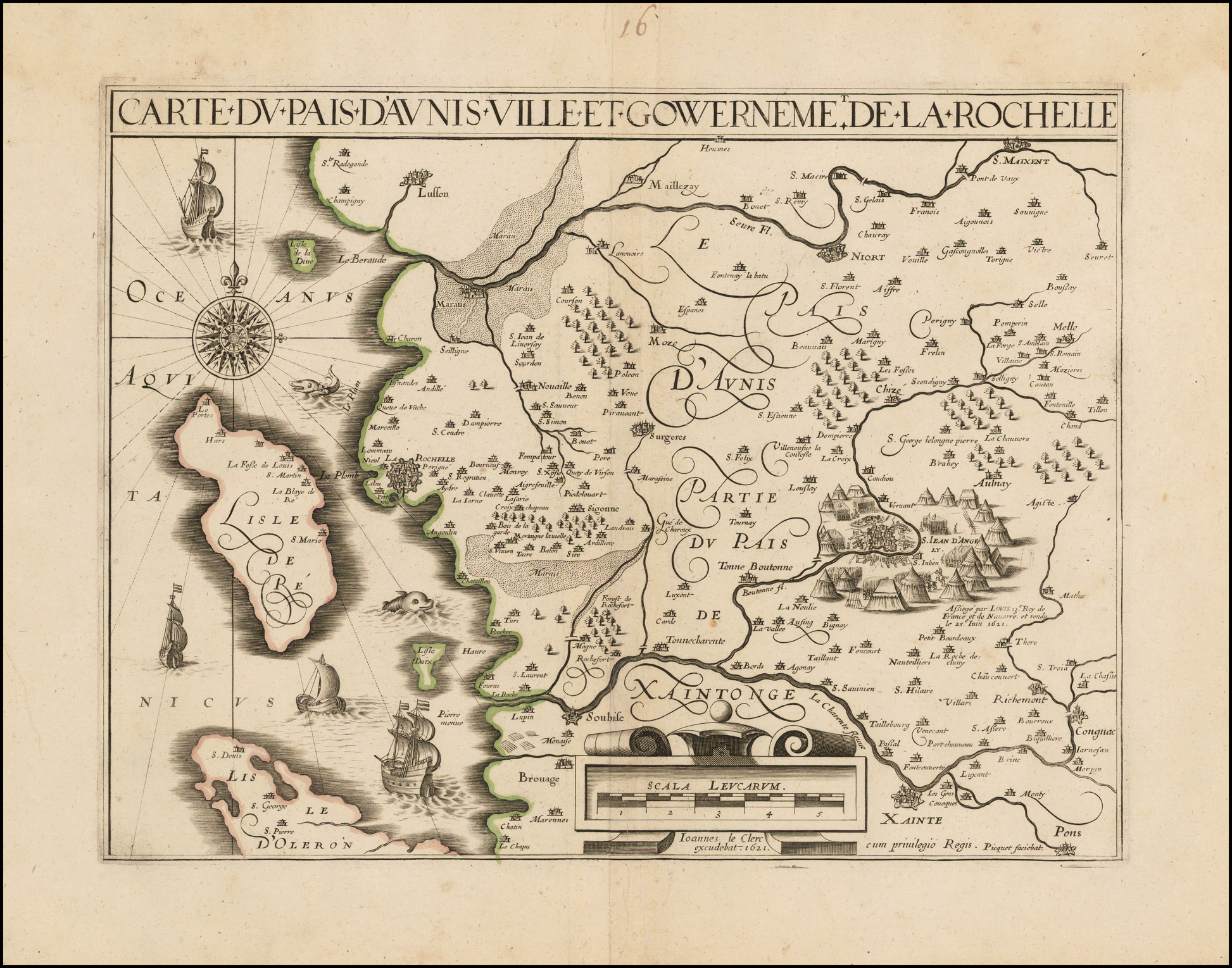 Carte Du Pais D'Aunis Ville Et Gowernemet De La Rochelle: Karte von La Rochelle und der weiteren Umgebung, Kupferstich (1621), von Jean Le Clerc in seinem Atlas Théâtre geographique du royaume de France (1620–1631) veröffentlicht.